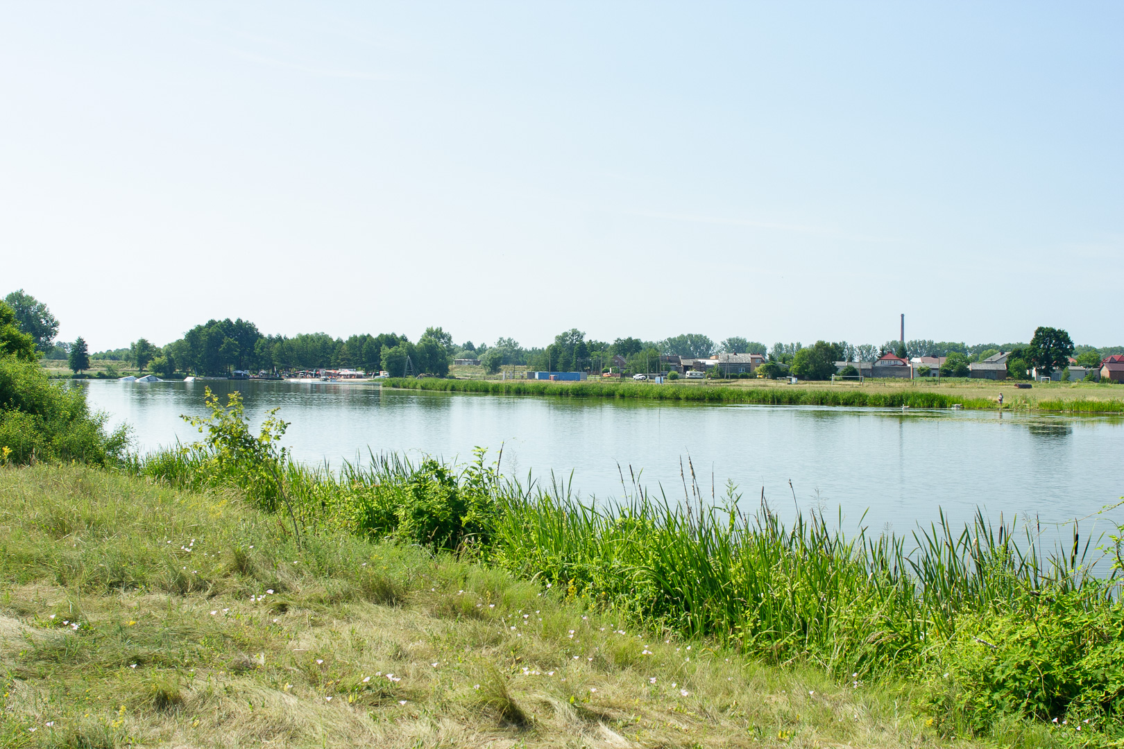 Jezioro Bielawskie Górne. Bielawa, gmina Konstancin-Jeziorna.